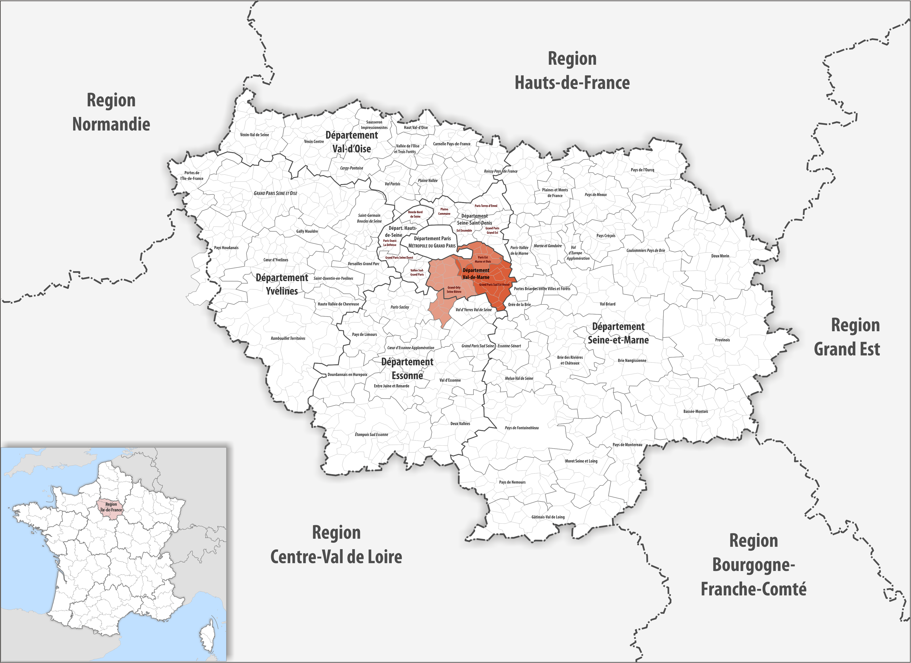 Gemeindeverbände im Département Val-de-Marne